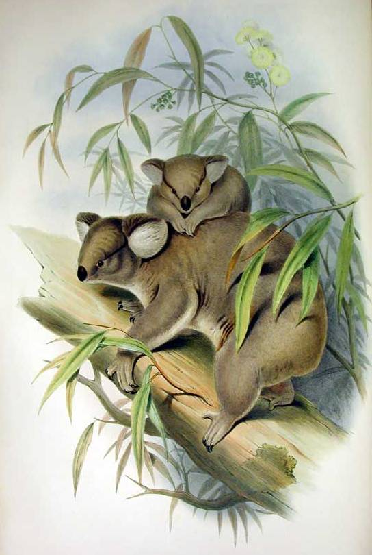 Phascolarctos cinereus